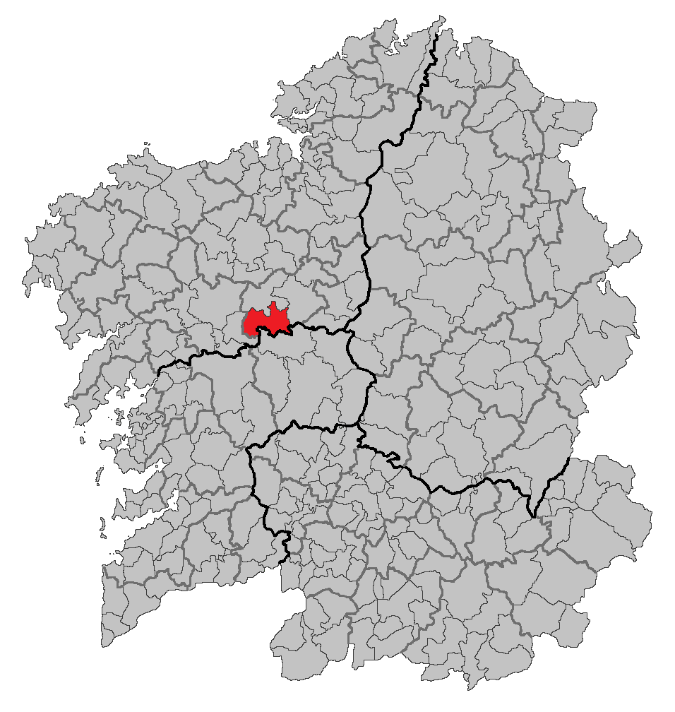 Mapa coa localización do concello de Touro.